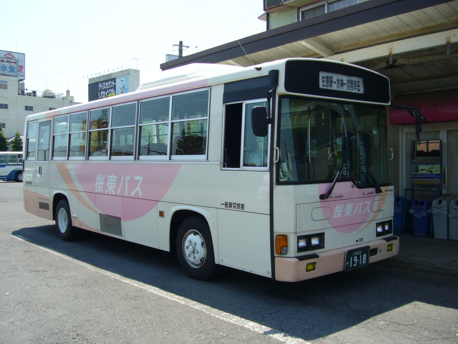 outou-bus sawara-satation,katori-city,japan